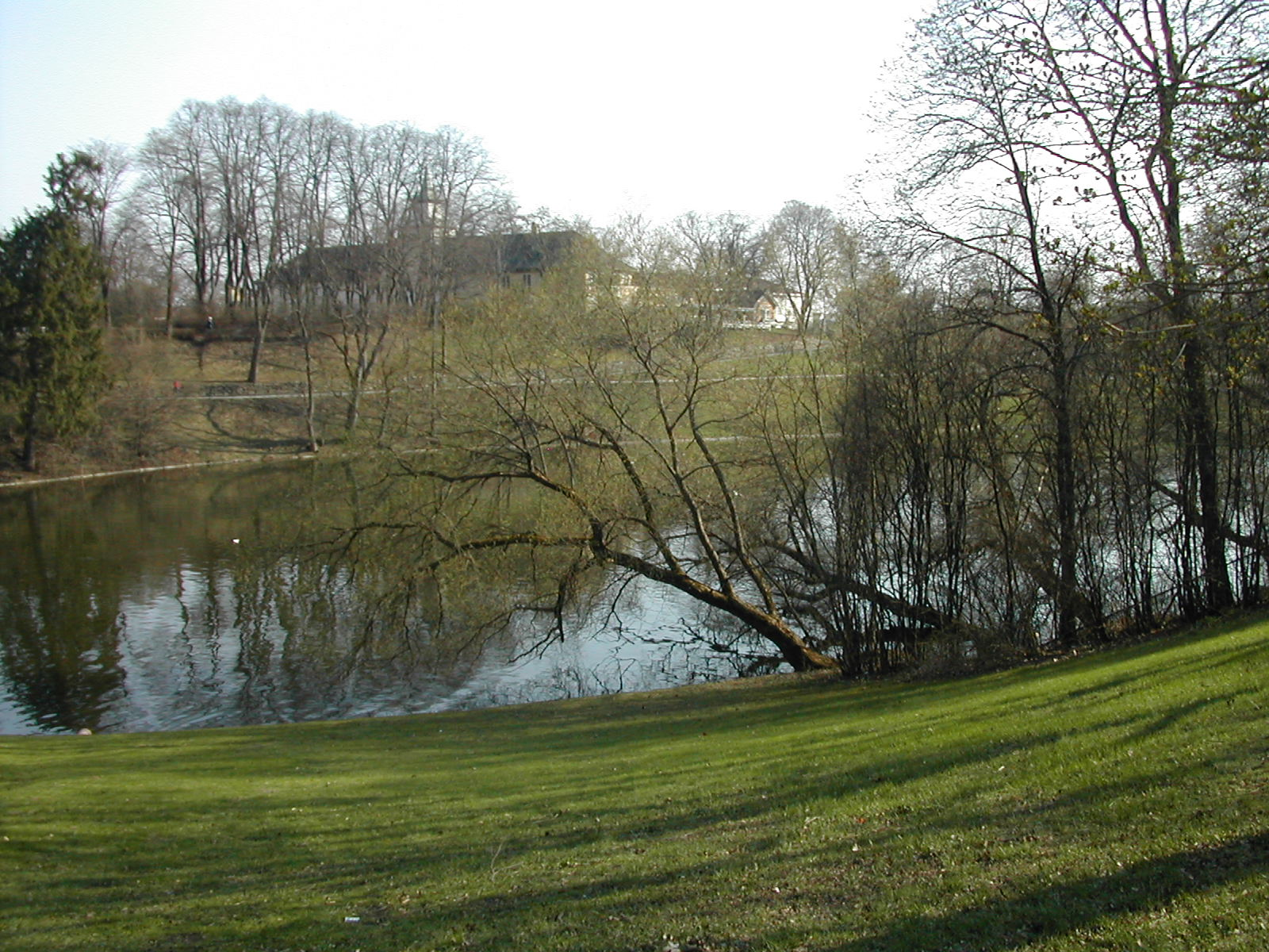 Frogner Manor in Oslo